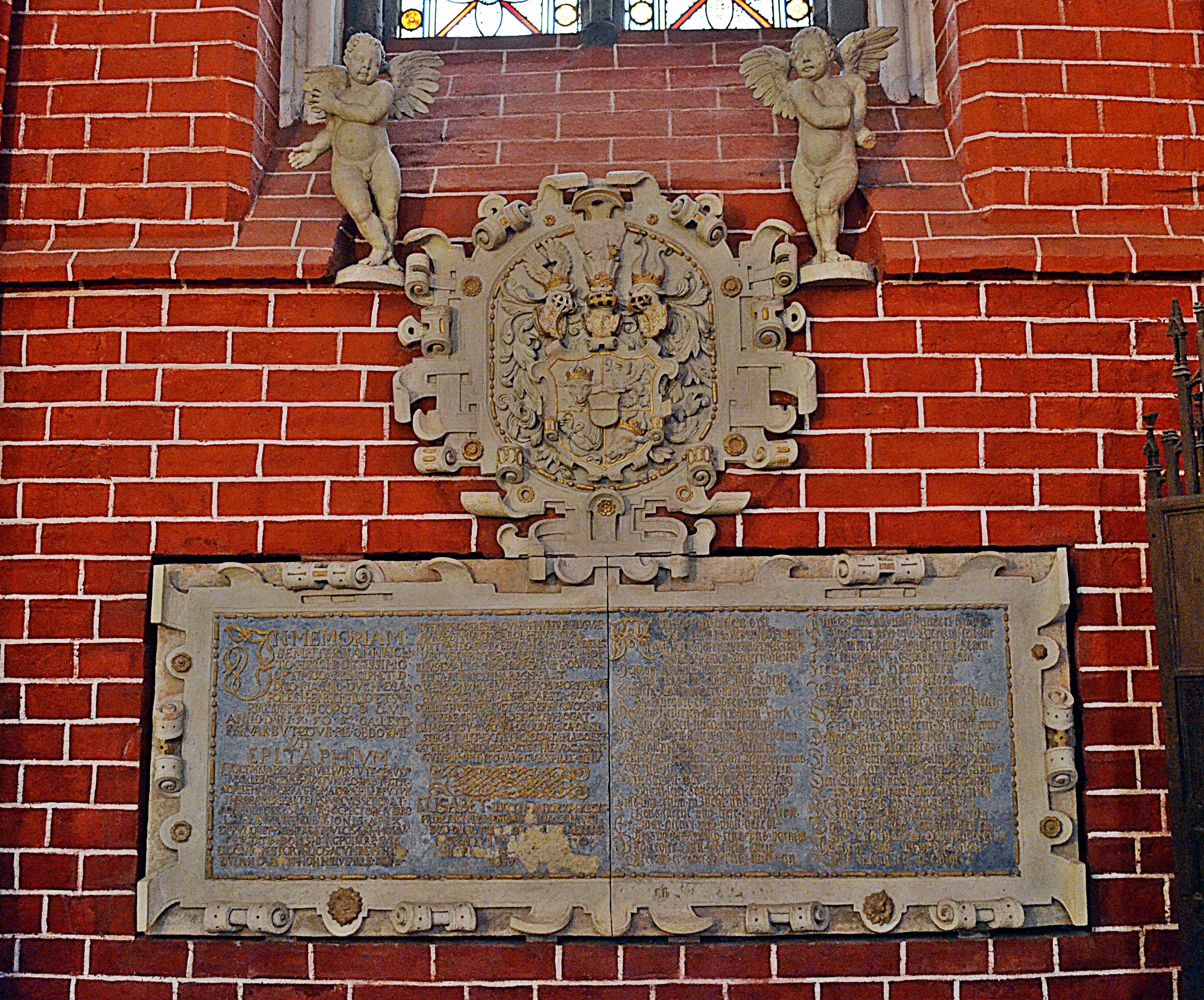 Bad Doberan, Münster, Pribislav Kapelle im nördlichen Querhaus, Gedenktafeln 1. S - Epitaph Magnus III., Herzog zu Mecklenburg